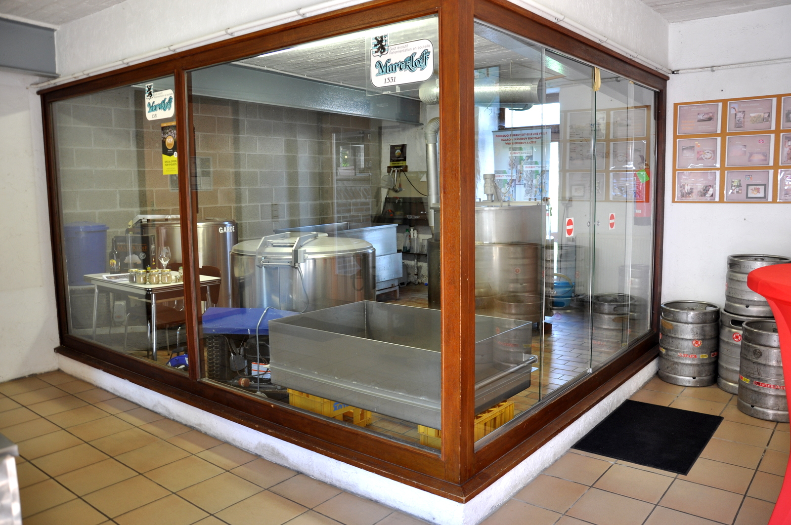 Brasserie Markloff in La Ferme au Chêne